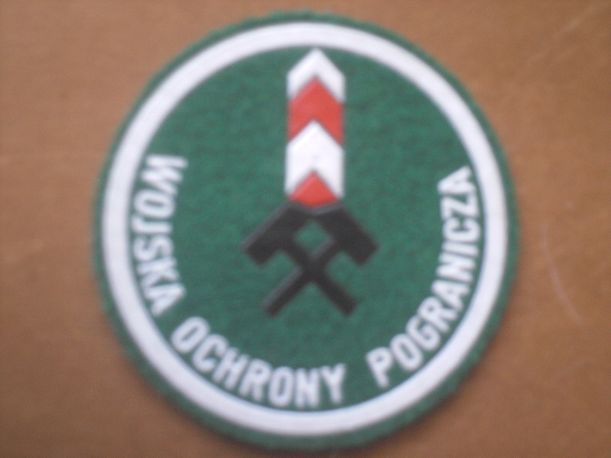 Plakietka Górnośląskiej Brygady WOP